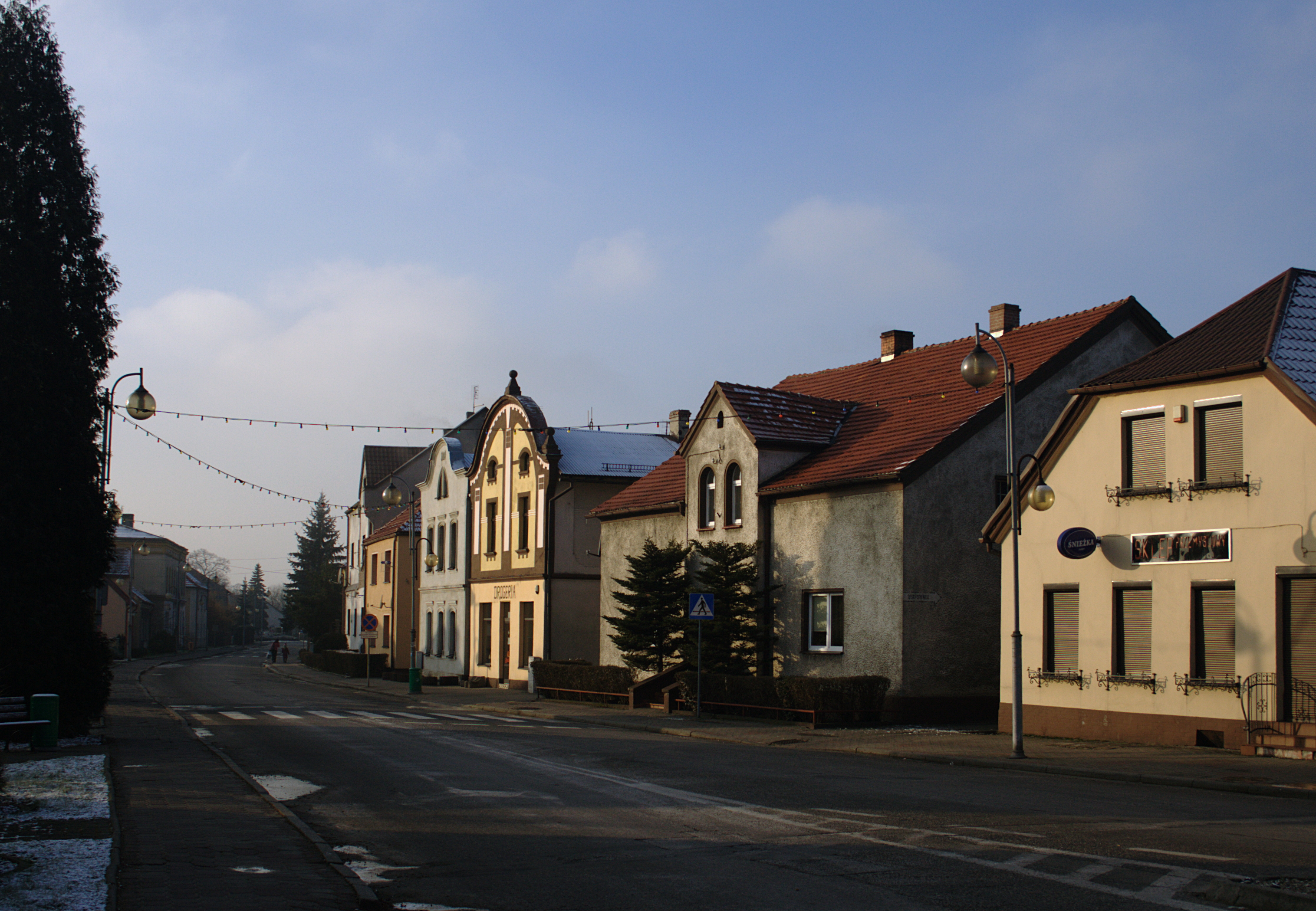 Ulica Słowackiego w Kuźni Raciborskiej